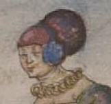 Hedvika Přemyslovna